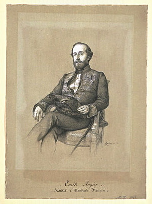 Émile Augier (1820-1889)